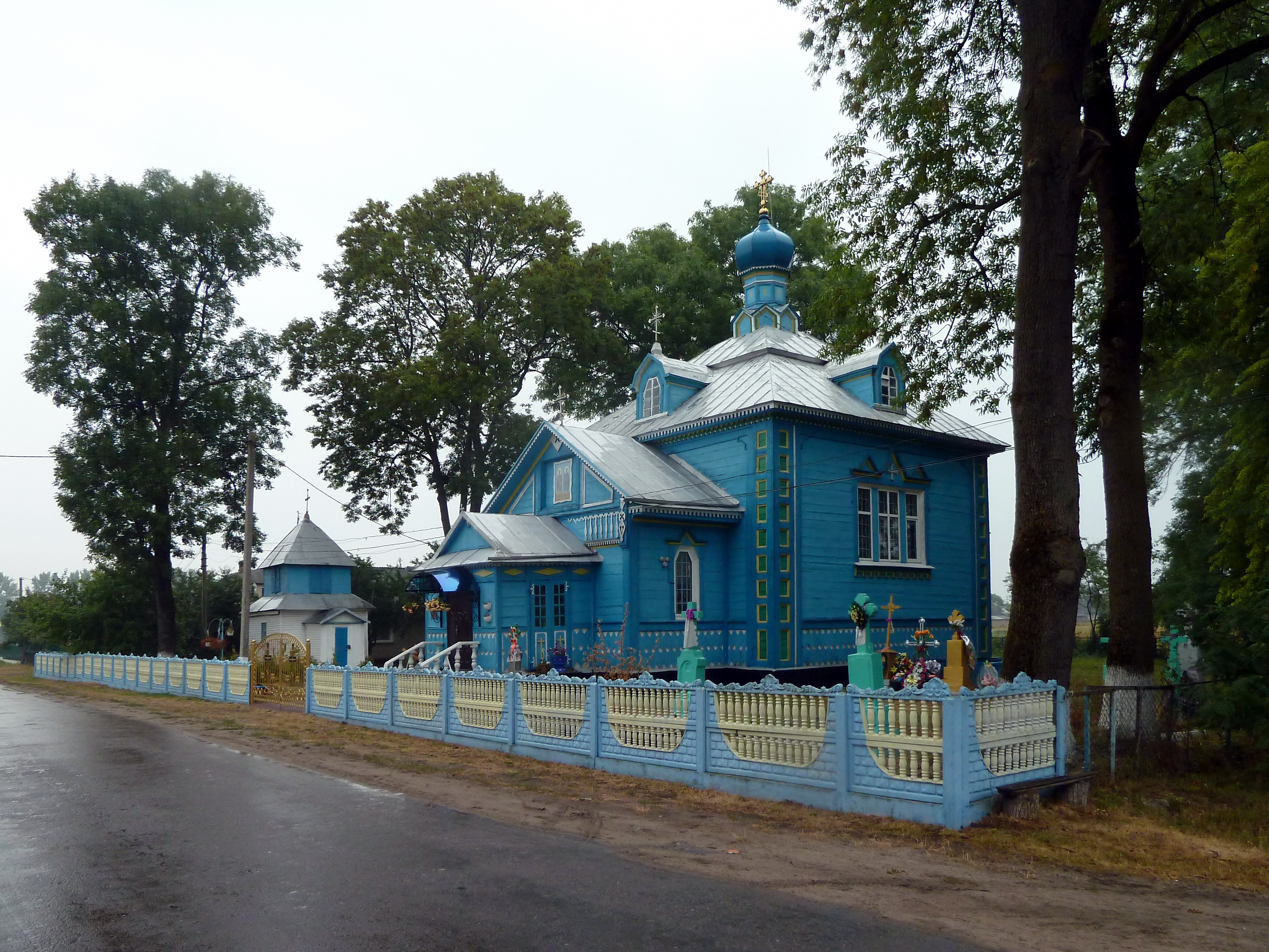 Церква Кузьмо-Дем’янівська (дер.) (1860 рік) - вигляд з південного заходу - с.Вишнів (вул.Незалежності) Любомльський район Волинська область Україна